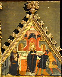 Retaule de Sant Marc i Sant Anià, obra d'Arnau Bassa (1346). Actualment a la Seu de Manresa. Taula de la detenció de Sant Marc, al pis superior del carrer dret